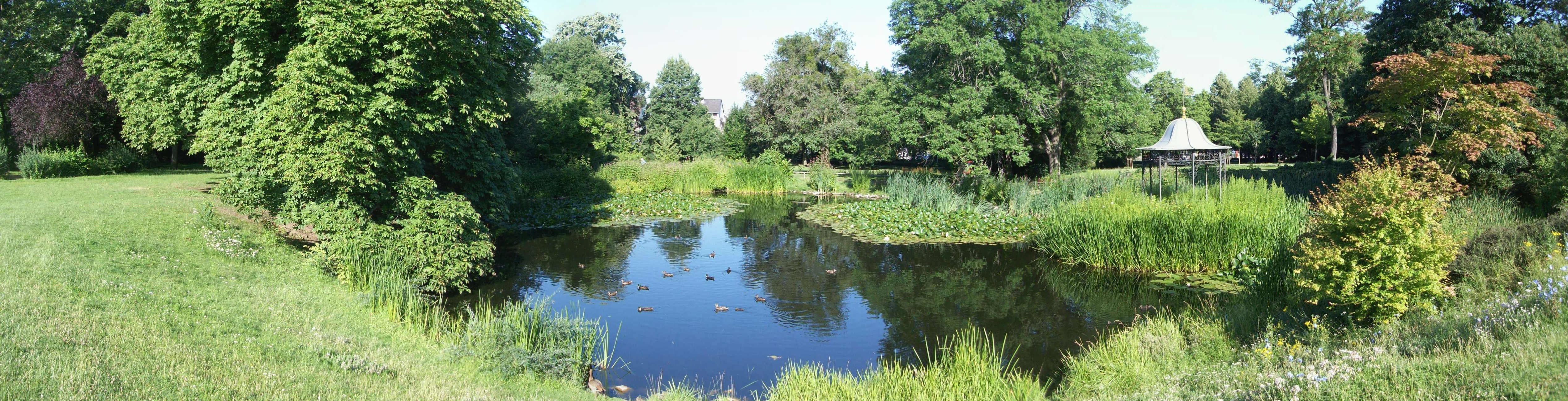 Die wiedererrichtete Teichanlage mit chinesischem Pavillon im Prinz-Emil-Garten (Blickrichtung Westen, im Rücken das Prinz-Email-Palais)